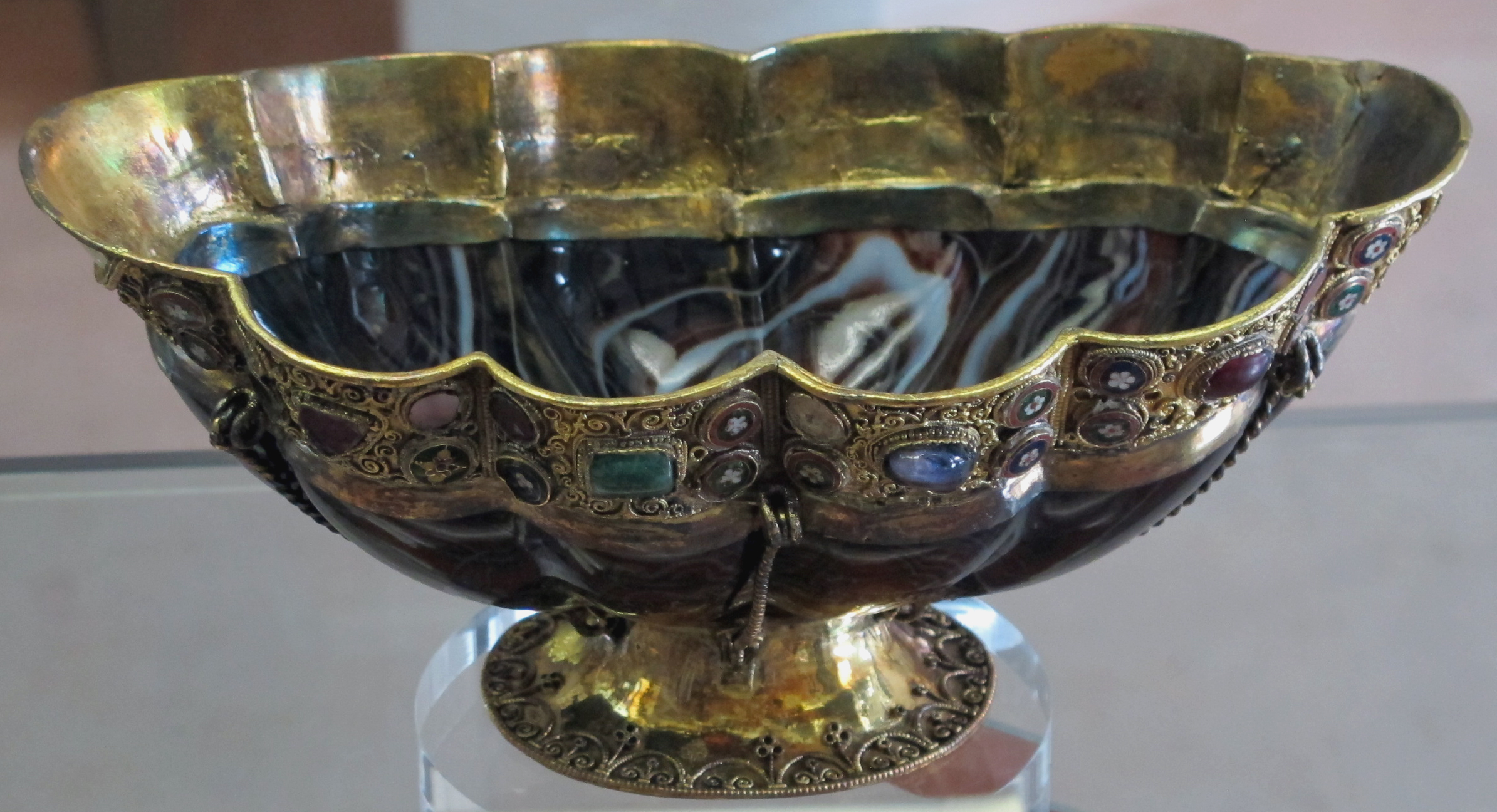 Arte bizantina, navetta della ste chapelle, sardonice, IX-X sec, con montatura ottoniana del 990-1010 ca.